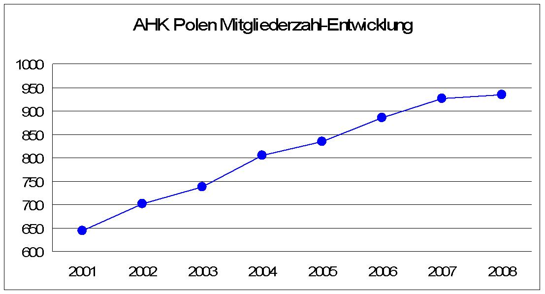 Entwicklung der Mitgliederzahl der DP IHK